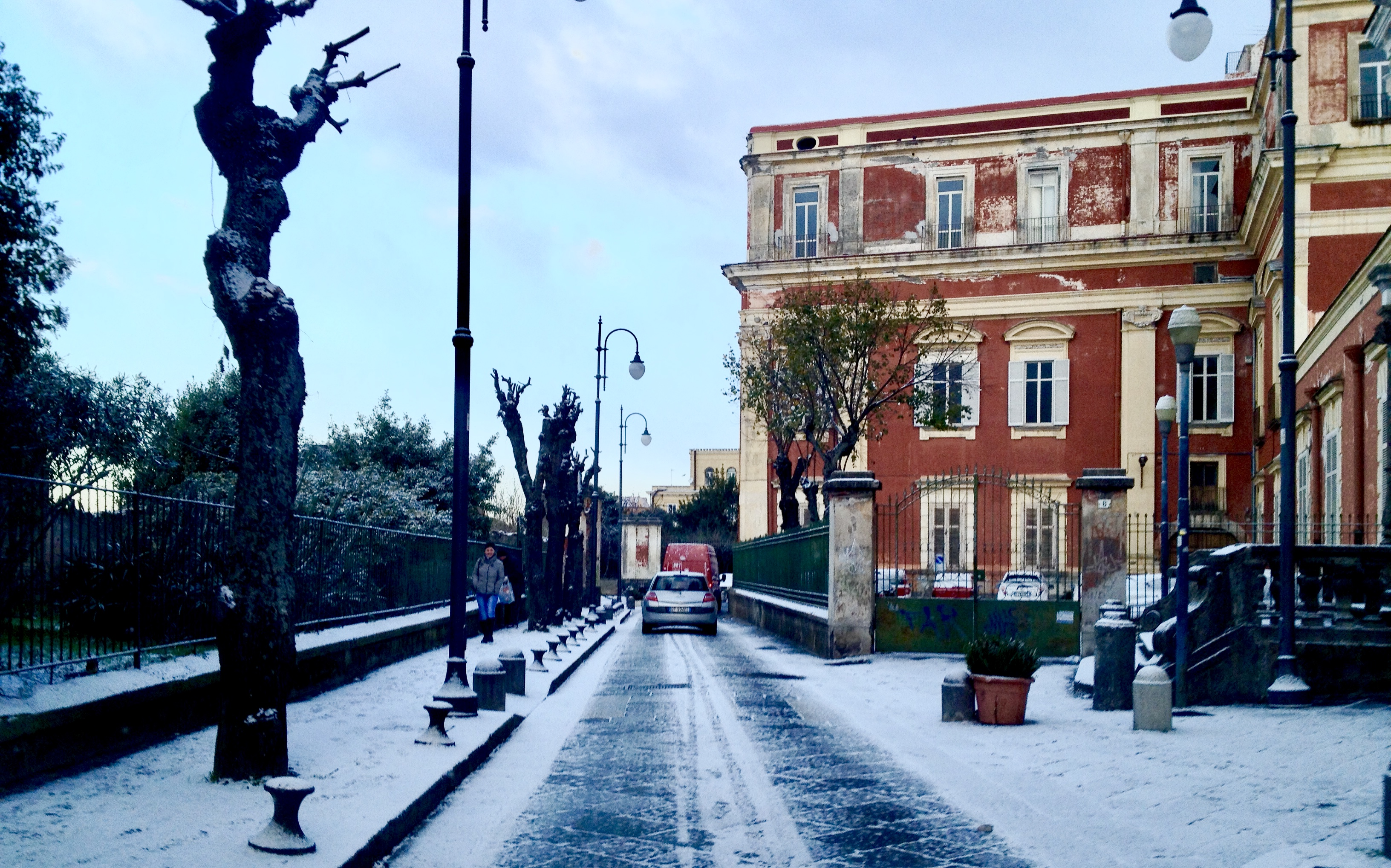 Palazzo Landriani, lato sinistro (31/12/2014).